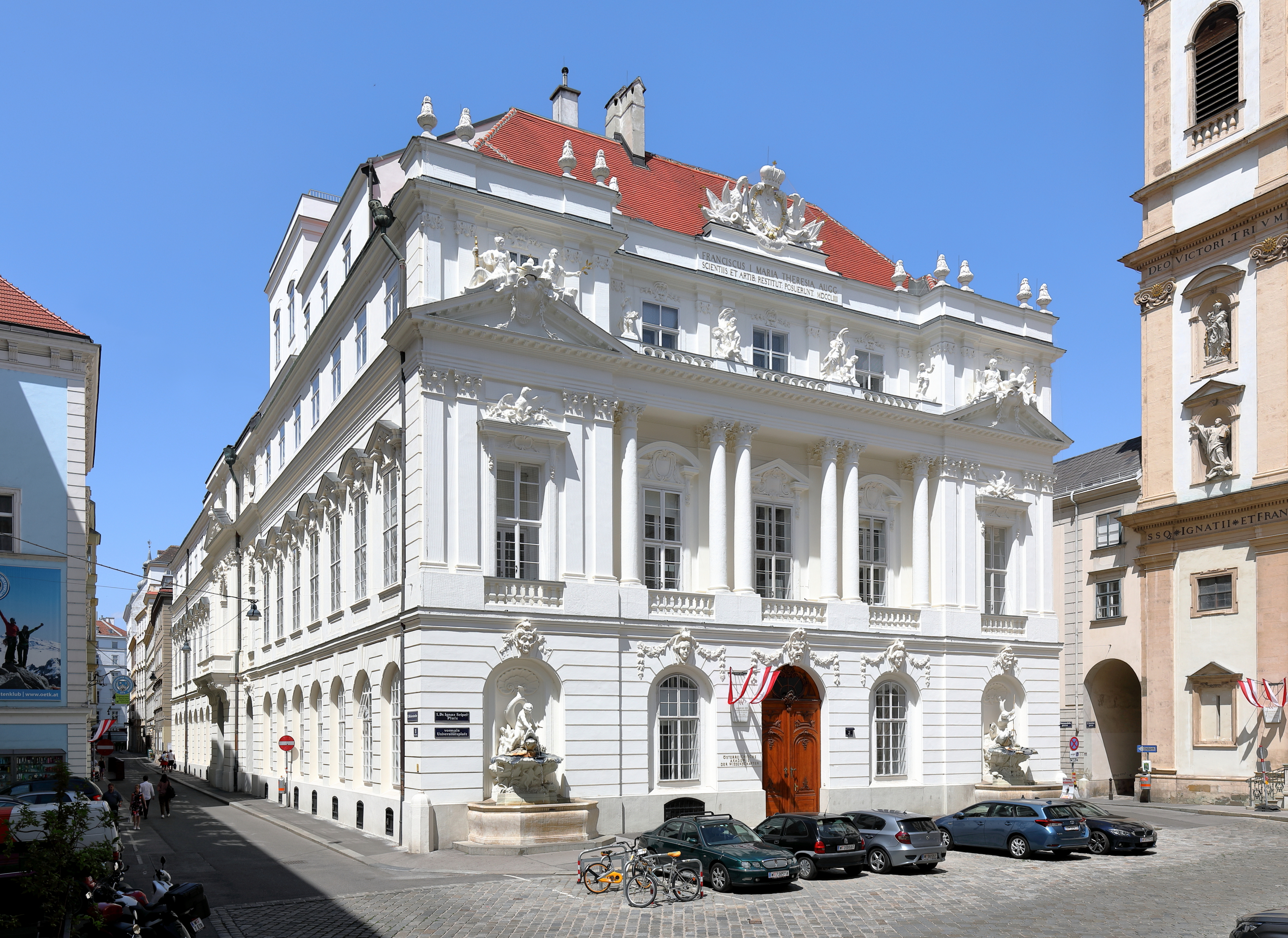 Sitz der Österreichischen Akademie der Wissenschaften (seit 1857) am Dr.-Ignaz-Seipel-Platz im 1. Wiener Gemeindebezirk Innere Stadt.Das Gebäude wurde von 1753 bis 1755 im Auftrag von Maria Theresia nach Plänen des Architekten Jean Nicolas Jadot de Ville-Issey als Neue Aula der Universität errichtet. Die Hauptfassade des Rokokobaus ist von Eckrisaliten mit Brunnen begrenzt.